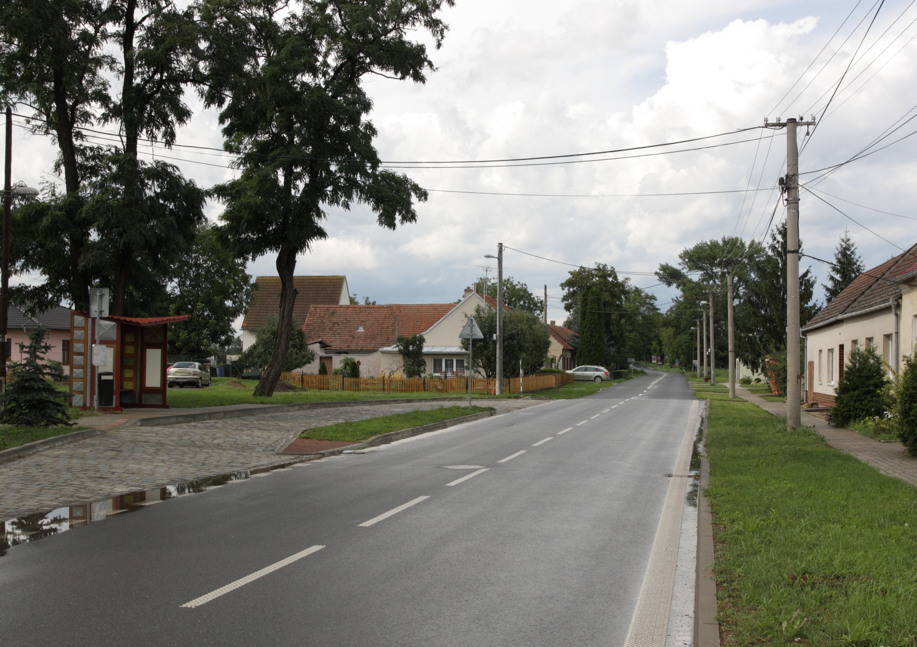 Odrovice - hlavní ulice, silnice II/395.